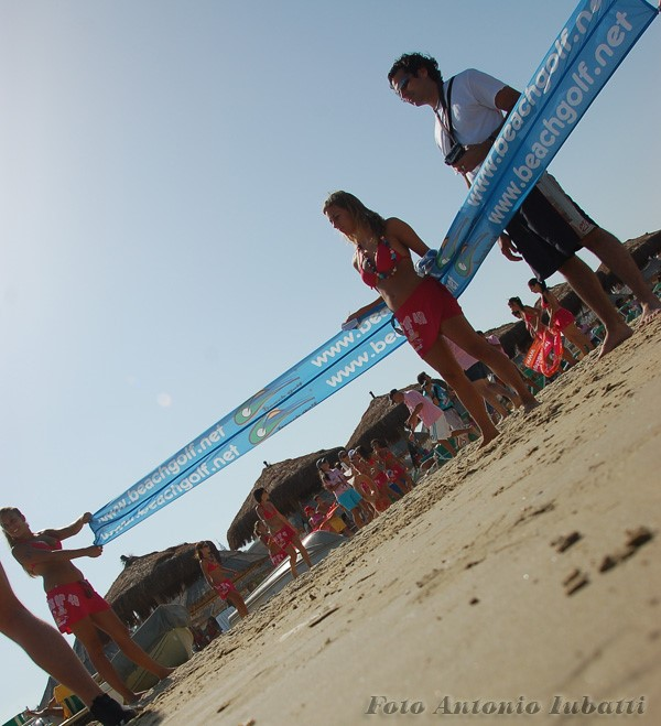 Zastitni pojas Beach golfa